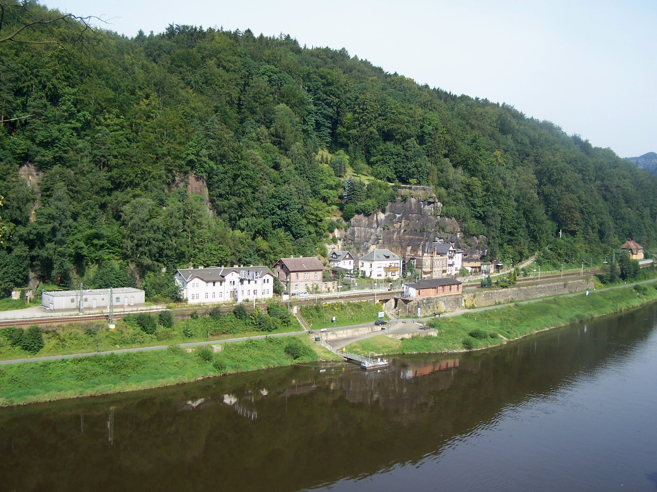 Bahnhof Schöna (Sächsische Schweiz) von der anderen Elbseite aus